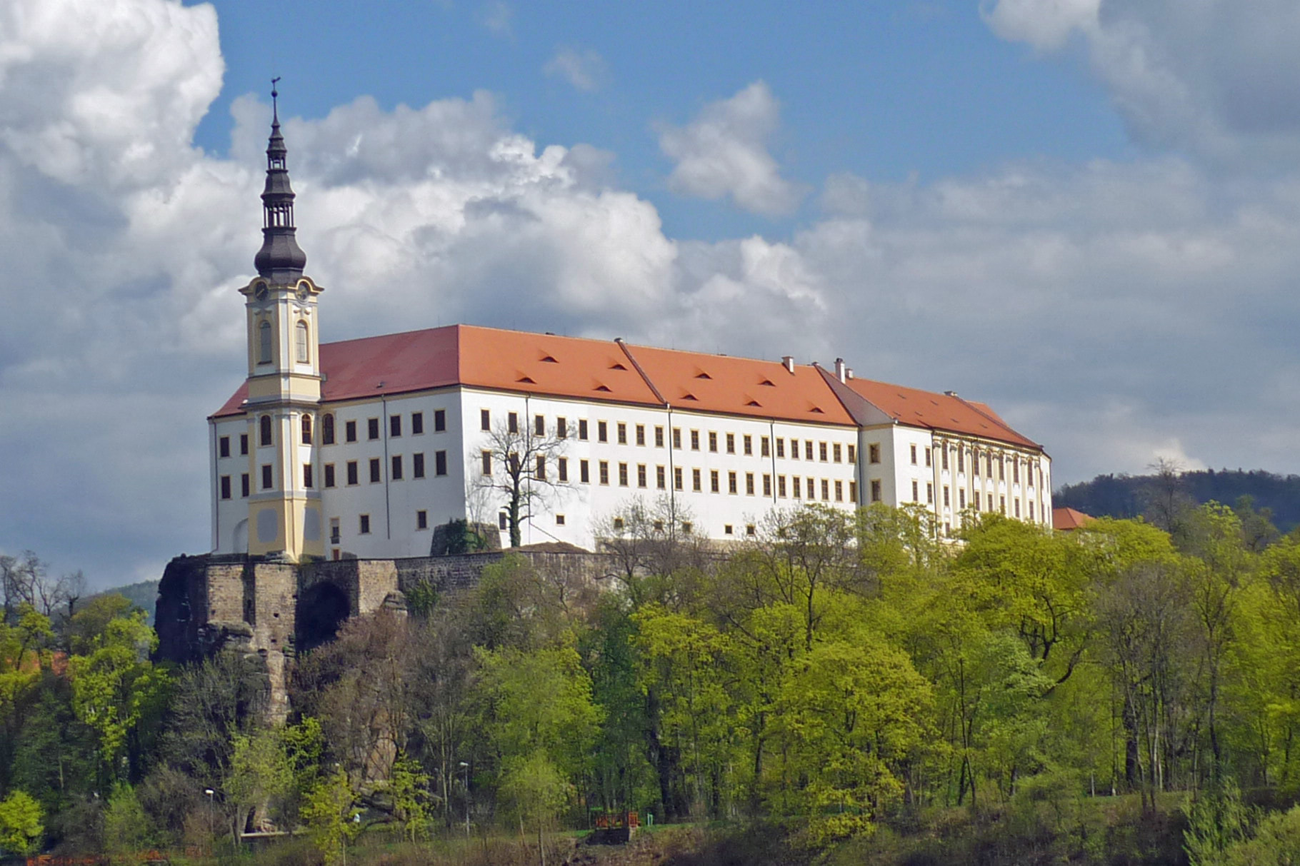 Schloss in Tetschen (Děčín) an der Elbe in Nordböhmen